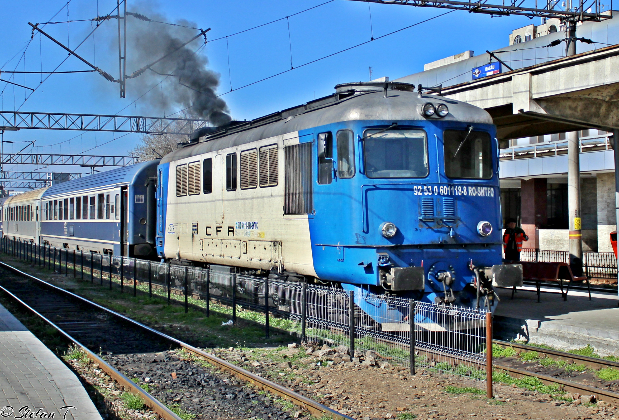 Manevre in Bacau.